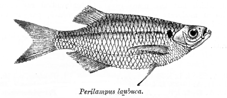 Perilampus laubuca = Laubuca laubuca (Hamilton, 1822)